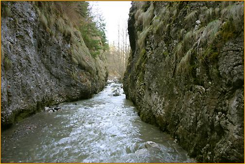 Cheile Geogeiului